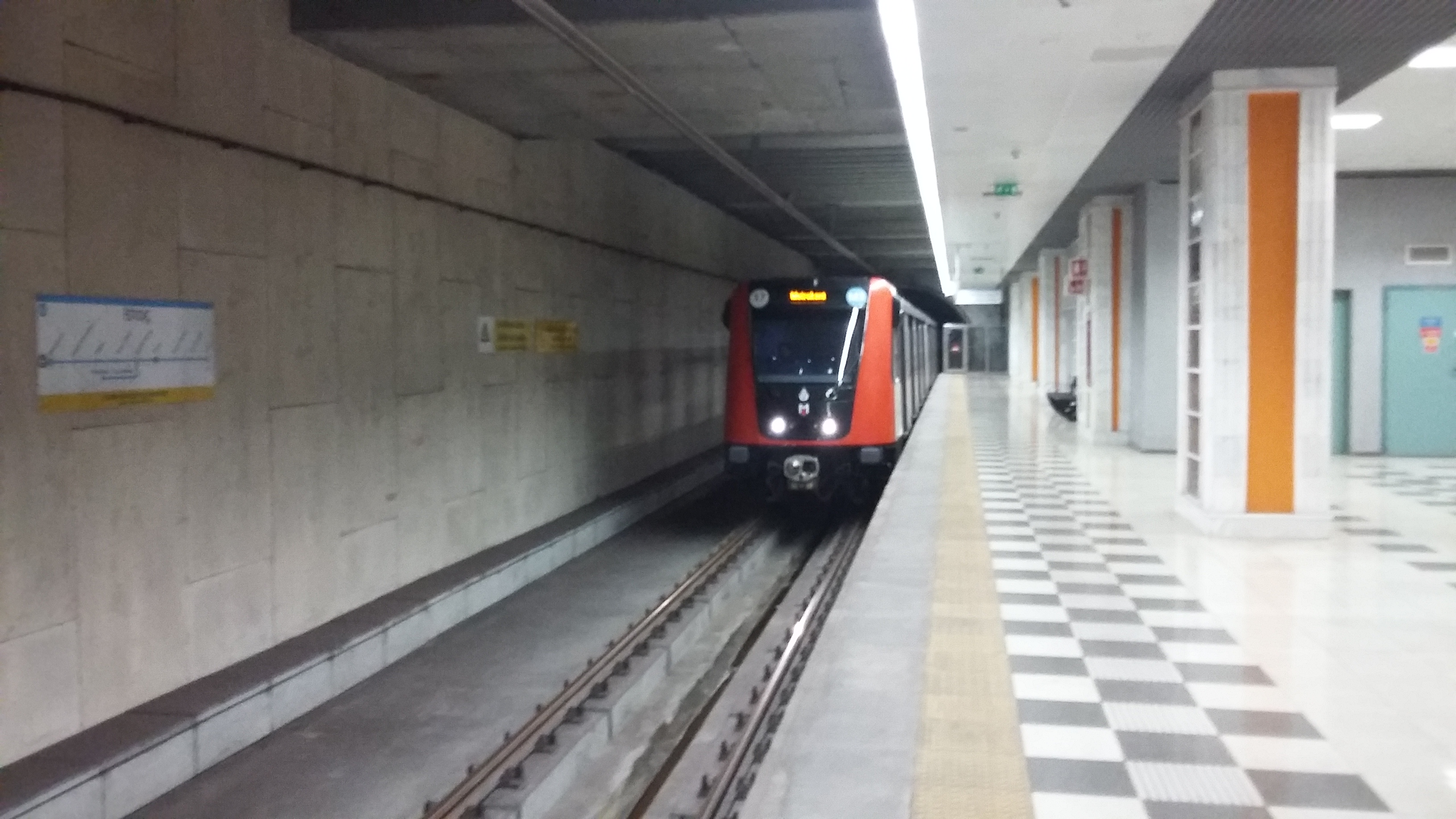 M3 İstoç Metro İstasyonu